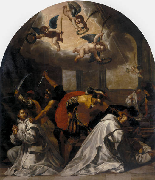 Martirio de cuatro monjes en la cartuja de Roermond.label QS:Les,"Martirio de cuatro monjes en la cartuja de Roermond."